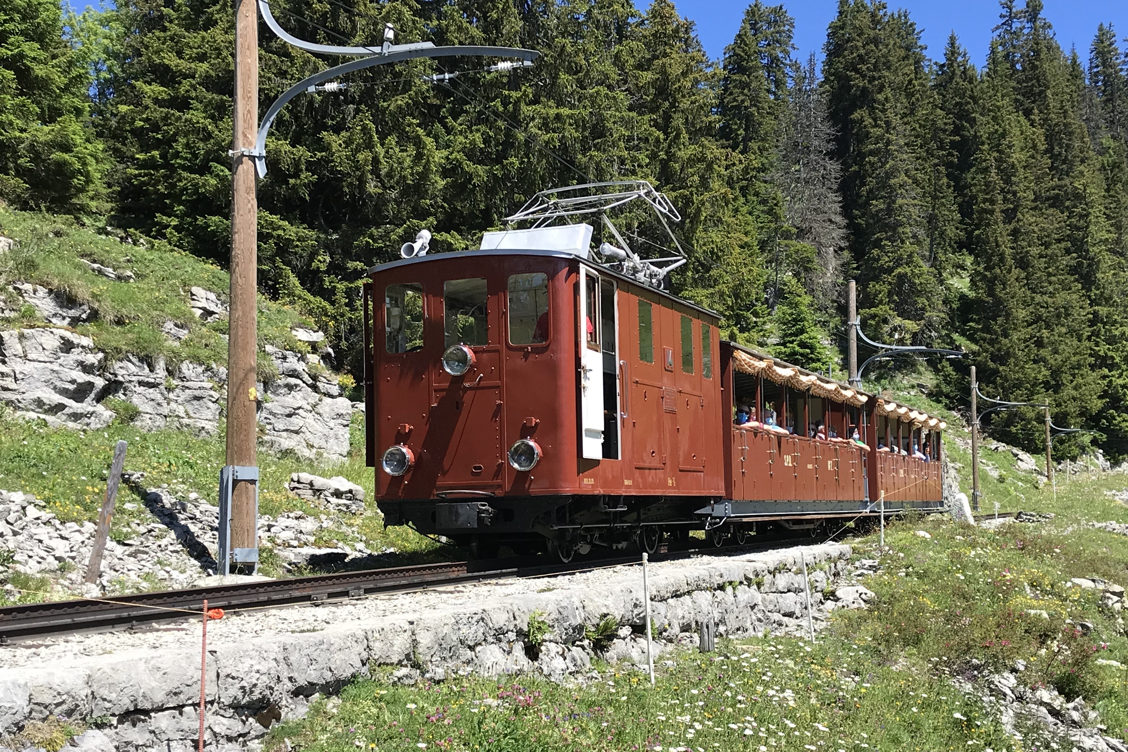 Original Zahnradlokomotiven He 2/2 Nummer 14, aus der Serie He 2/2 11 bis 14, in rotbrauner Farbgebung der Schynige Platte-Bahn. kurz SPB, im Bigelti mit den ebenfalls rotbraunen offenen Vorstellwagen (Sommerwagen) Nummer 7 und Nummer 3. Der Begriff Schynige Platte-Bahn steht dabei als Geschäftsbezeichnung für die Bahnstrecke Wilderswil–Schynige Platte der Berner Oberland-Bahnen, kurz BOB.